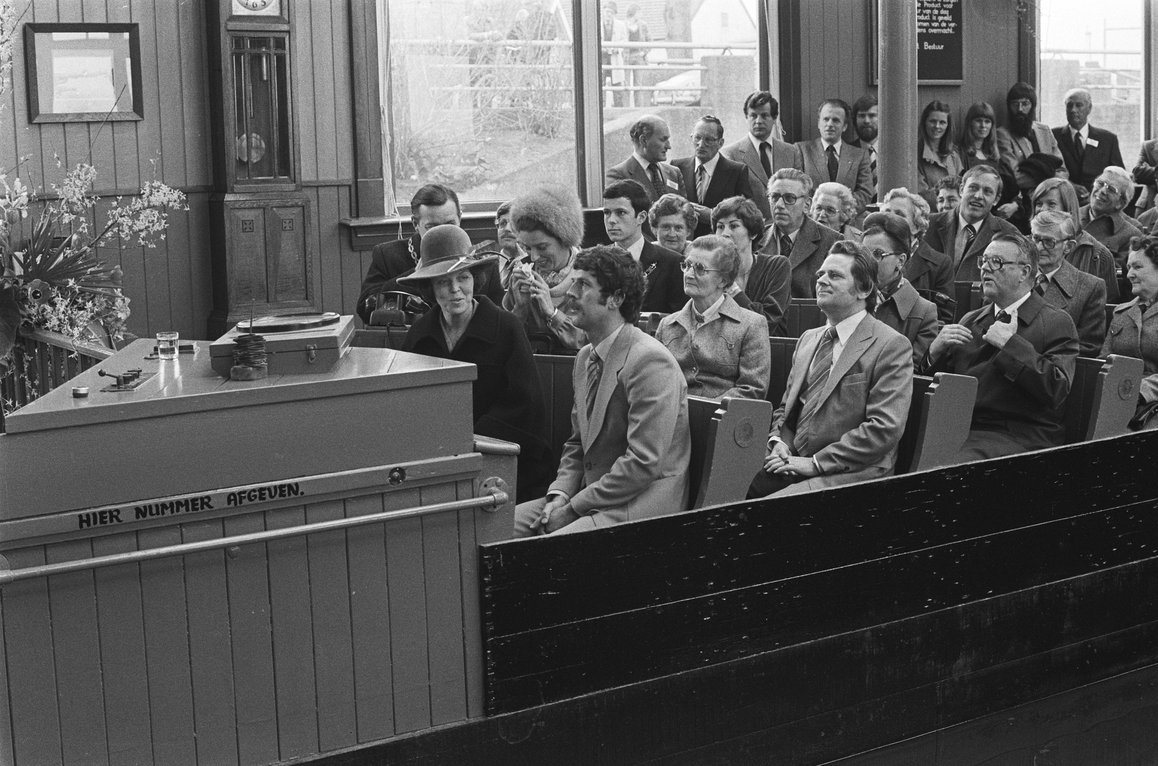 Collectie / Archief : Fotocollectie Anefo Reportage / Serie : Prinses Beatrix opent de "Broeker Veiling" in Broek op Langedijk Beschrijving : Tijdens de opening Datum : 3 april 1979 Locatie : Broek op Langedijk, Noord-Holland Trefwoorden : aankomst en vertrek, bloemen, prinsessen, veilingen Persoonsnaam : Beatrix, prinses Fotograaf : Croes, Rob C. / Anefo Auteursrechthebbende : Nationaal Archief Materiaalsoort : Negatief (zwart/wit) Nummer archiefinventaris : bekijk toegang 2.24.01.05 Bestanddeelnummer : 930-1980